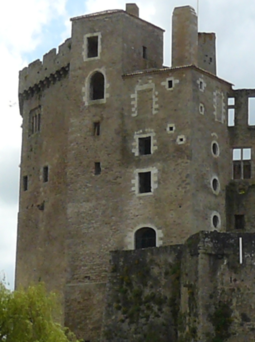 Tours rectangulaires du château de Clisson